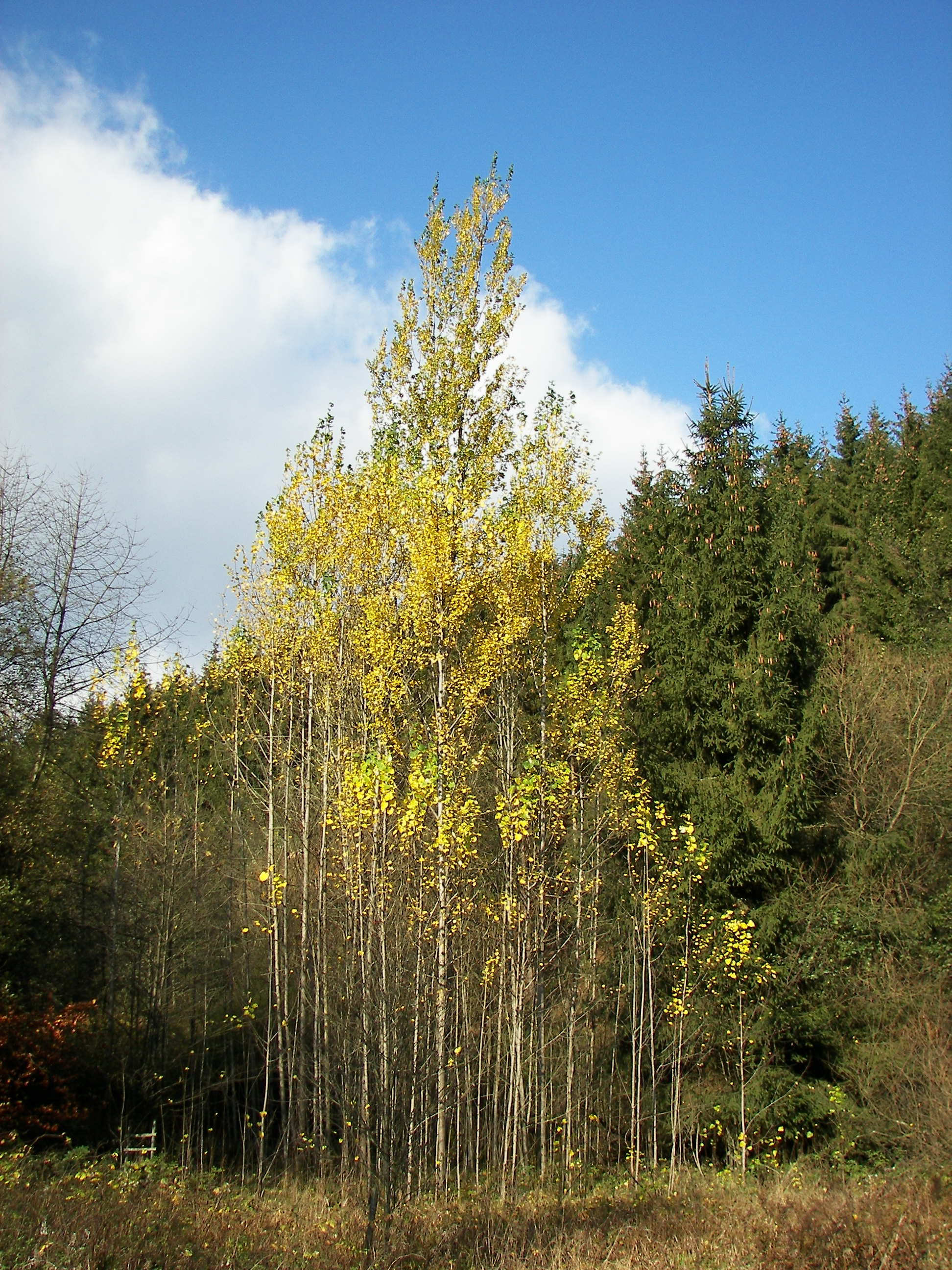 Espengruppe (Populus tremula) in der Nähe der Lahnquelle, Gemeinde Netphen, Nordrhein-Westfalen, Deutschland